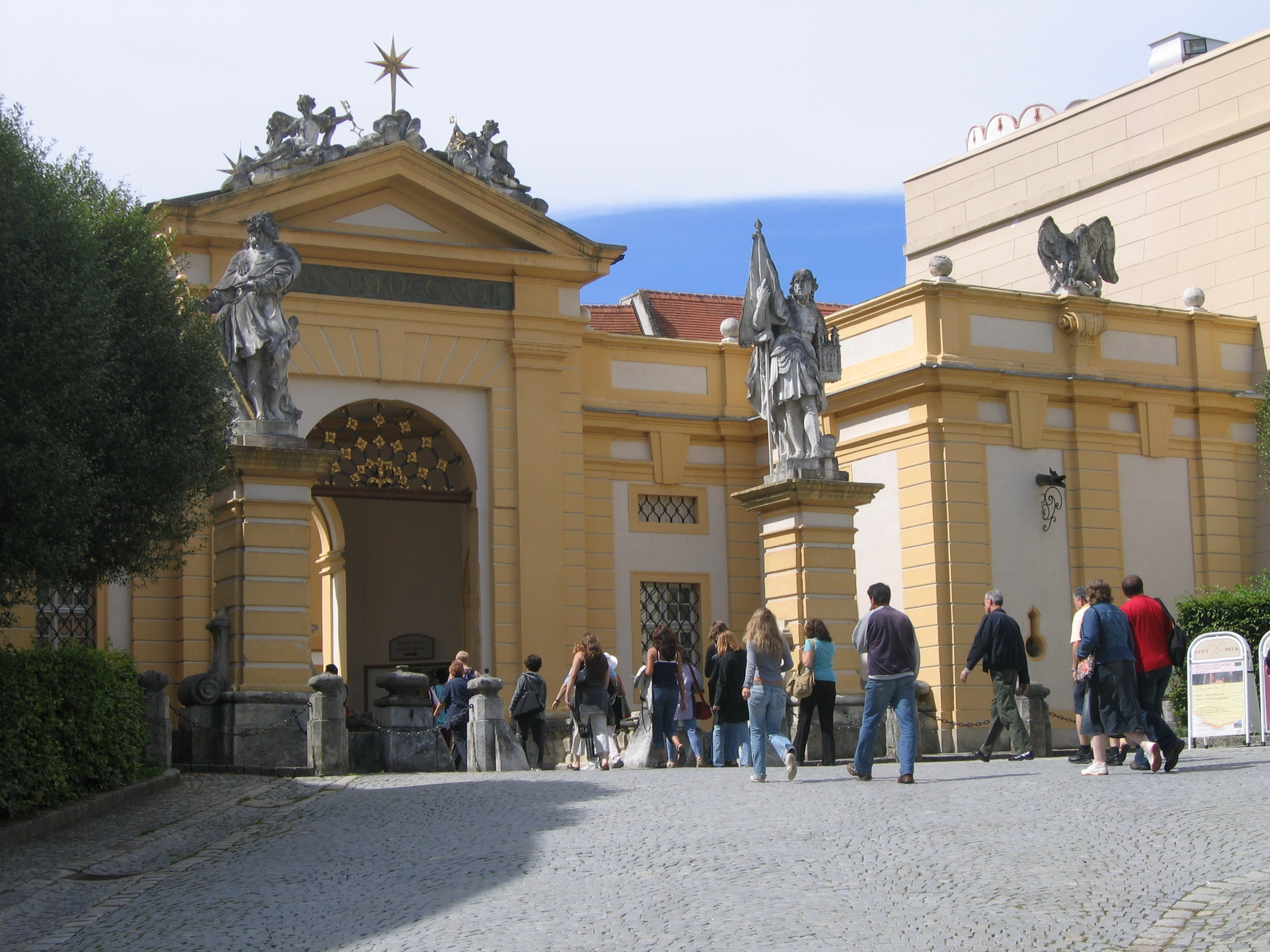 Stift Melk, Austria, Main Portal